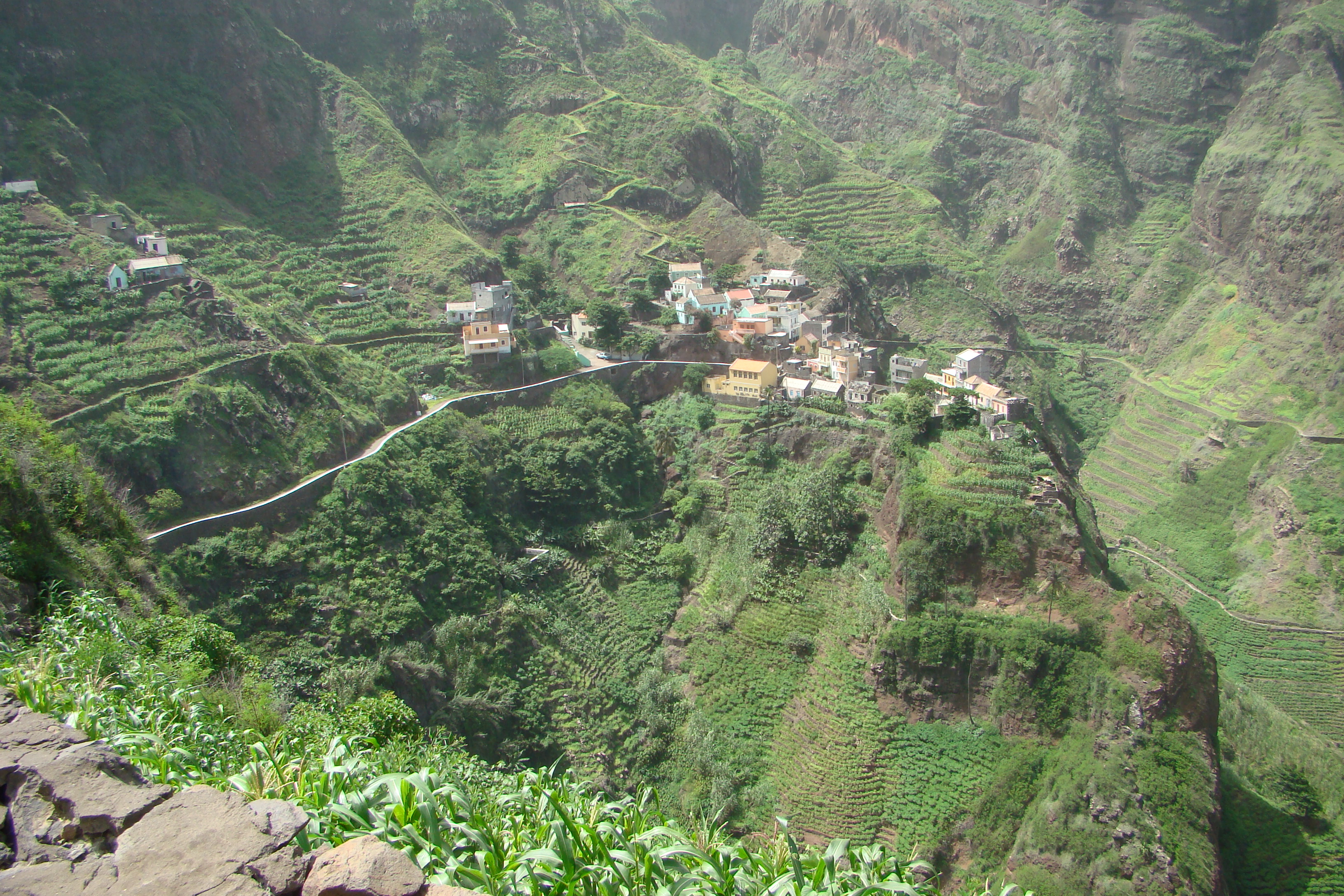 Vista de la localidad de Fontainhas, en la isla de Santo Antao (Cabo Verde)